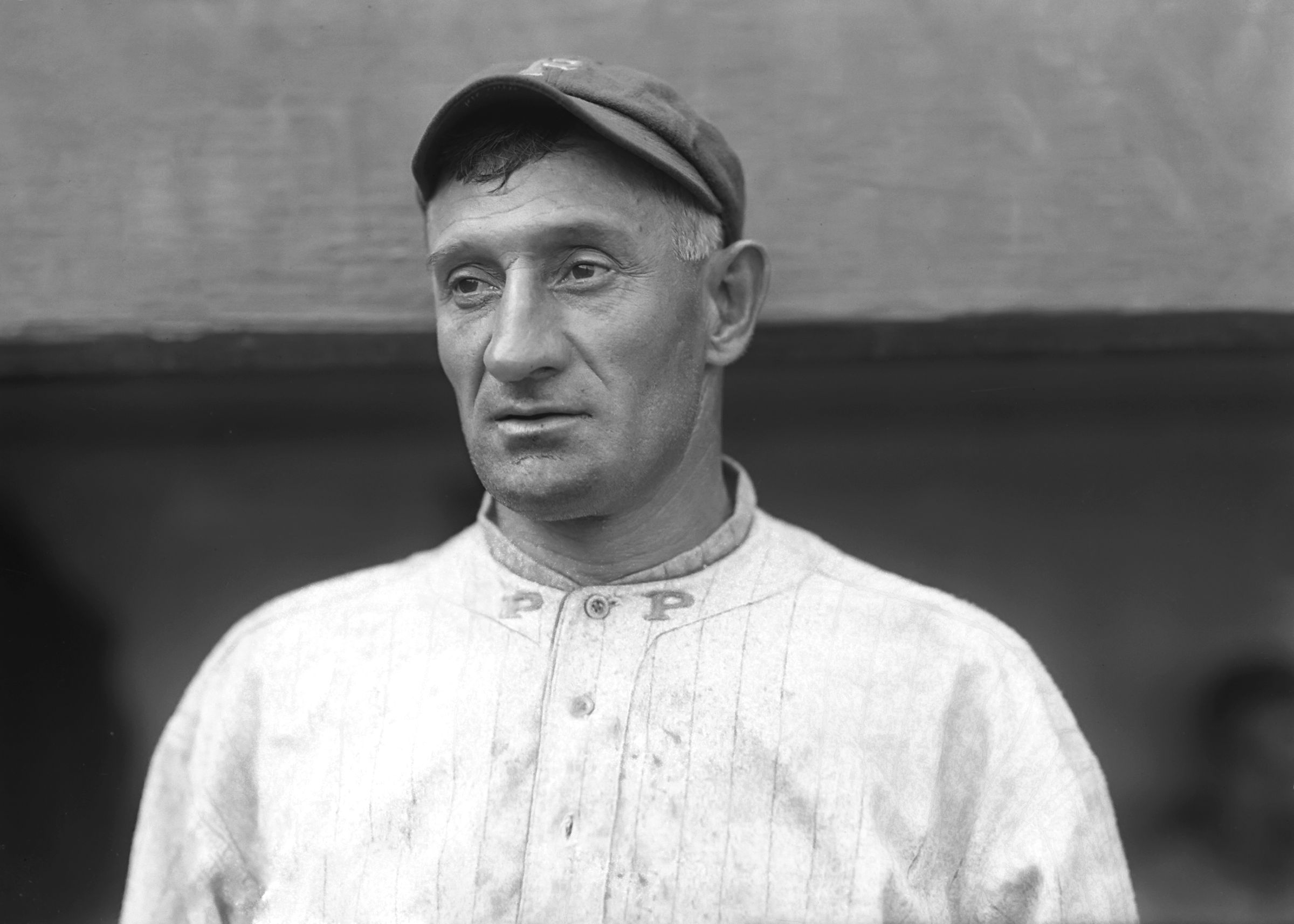 Honus Wagner